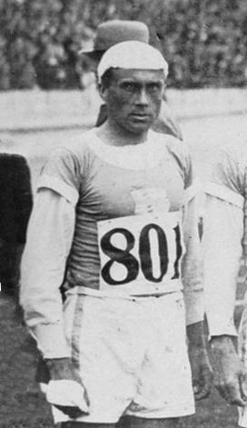 Olympische Spelen 1928 Amsterdam, Nederland. Atletiek. Finse marathonlopers. Eino Rastas.